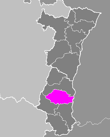 Maps of arrondissements and cantons of France: Arrondissement de Guebwiller.PNG (Région Alsace)